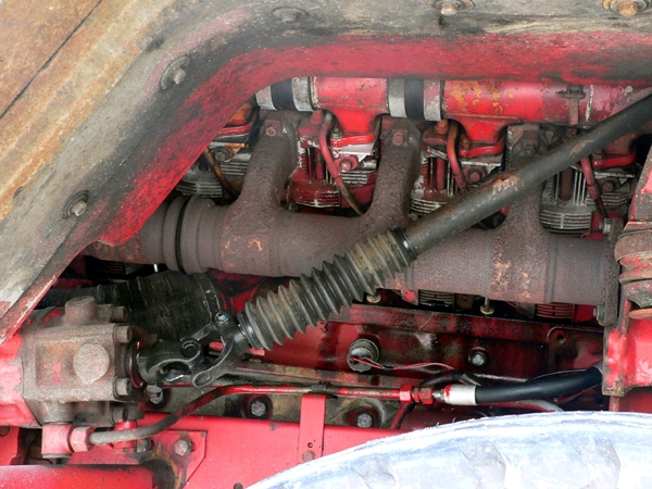 Карданный вал и рулевой механизм рулевого управления